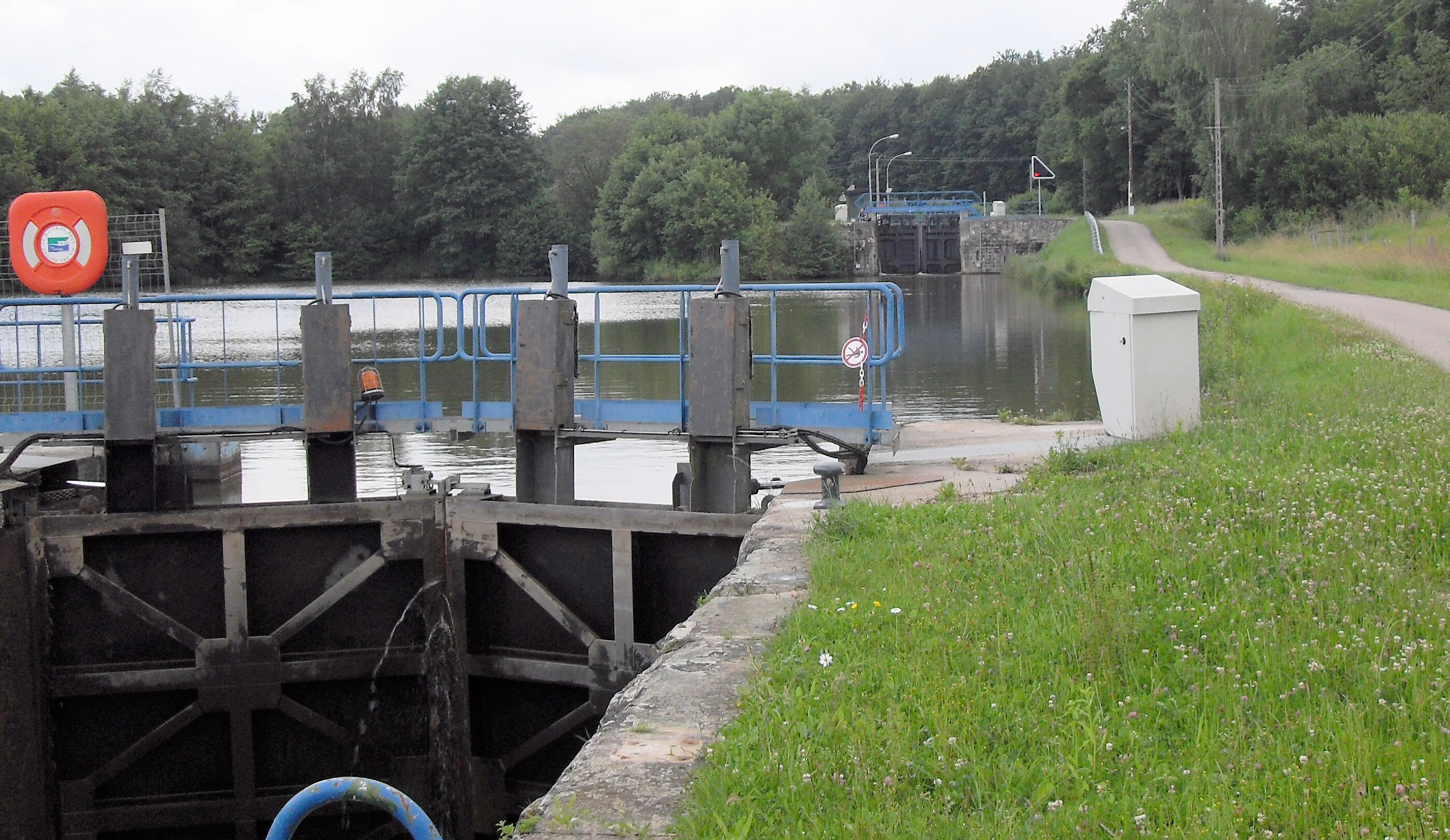 La chaîne d'écluses de Golbey, vue depuis l'ouest sur l'écluse 3M et 2M